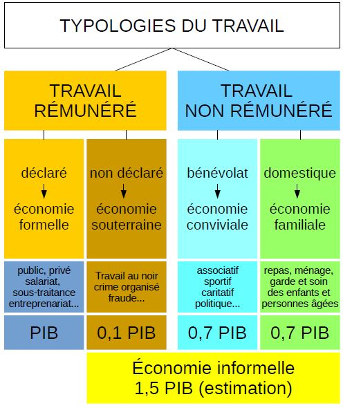 tableau de synthèse permettant d'identifier les différents types d'économie à partir du type de travail effectué.